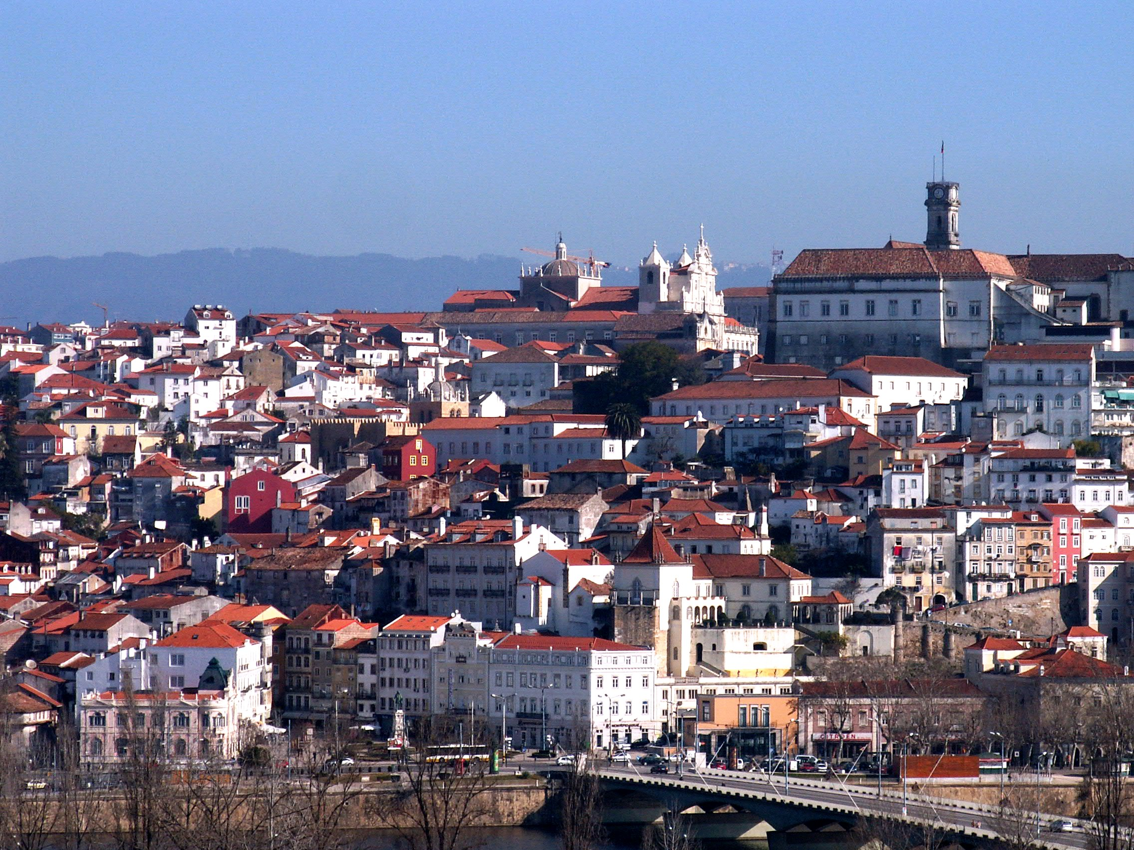 Coimbra